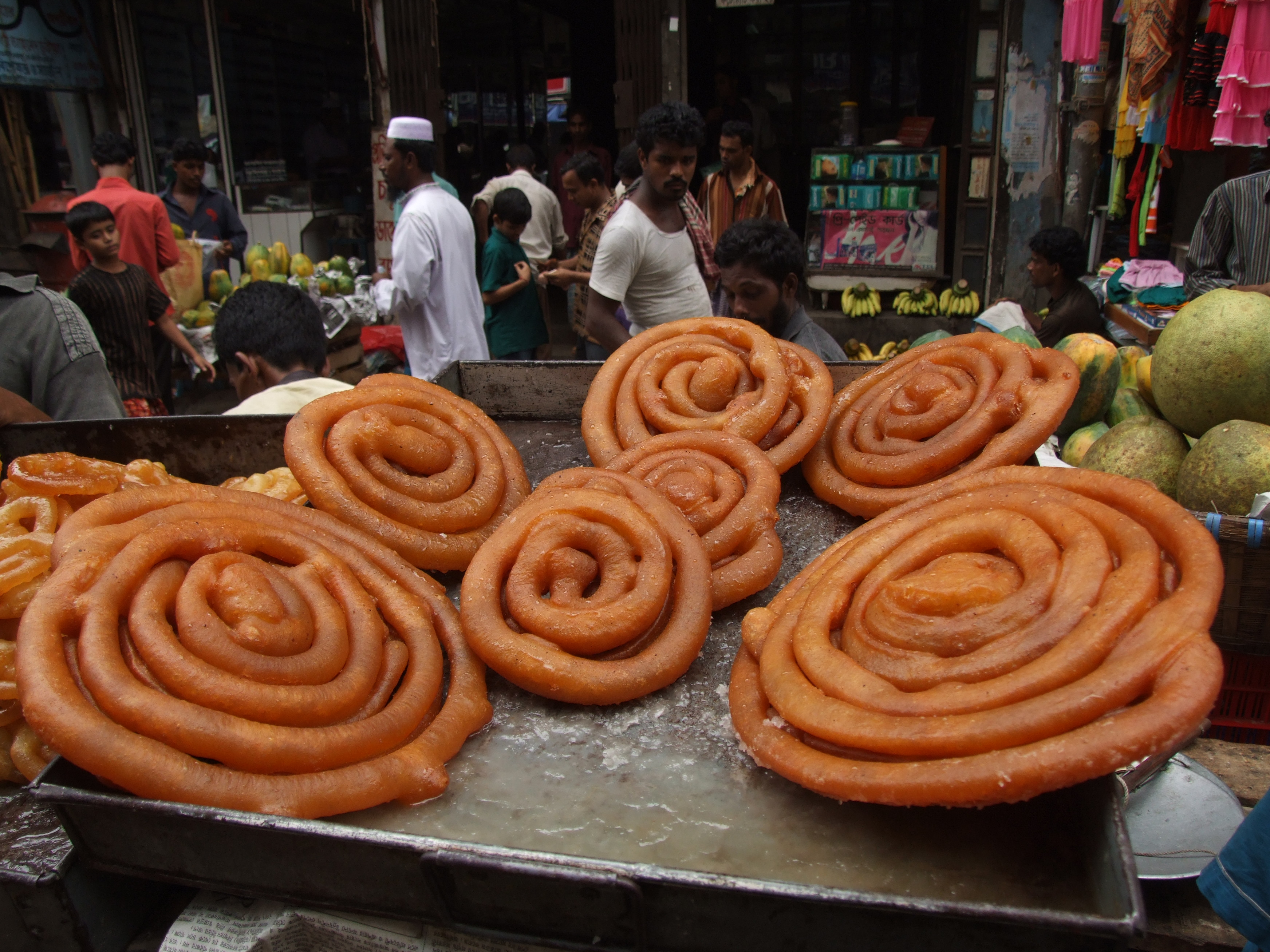 Iftar items available @ puran Dhaka